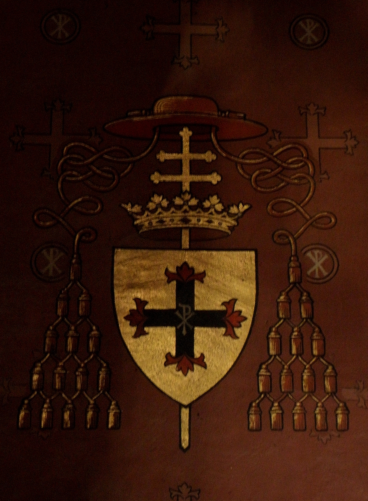 Tombeau du cardinal Aimé-Victor-François Guilbert en la cathédrale Saint-André de Bordeaux. Armes du prélat.